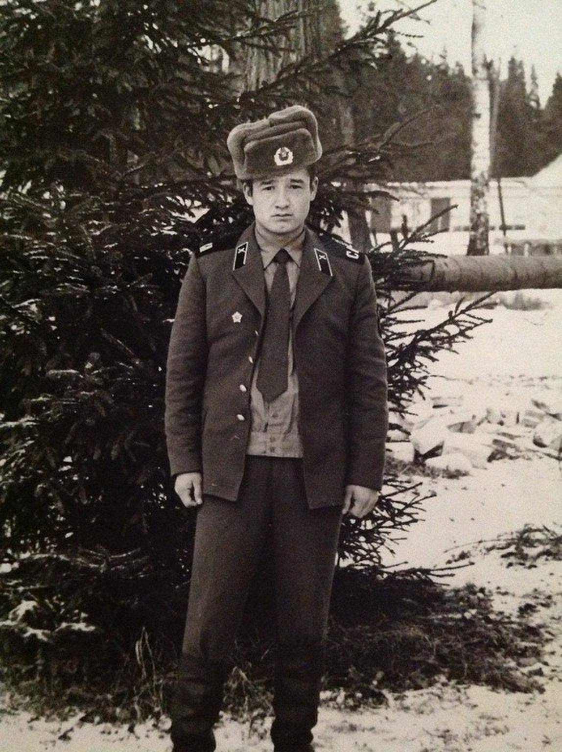 Тоҷикӣ: Хангоми адои хизмат дар Москва